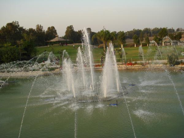 סחלבים בפארק האוטופיה